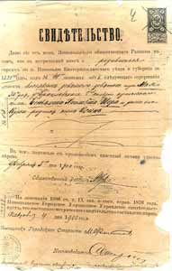 Свідоцтво про народження Осипа Шора: «Свидетельство. Дано сие отъ меня Никопольскаго общественнаго Раввина въ томъ, что въ метрической книге о родившихся евреяхъ по м. Никополю Екатеринославскаго уезда и губерніи за 1899 годъ подъ номеромъ 41 написанъ актъ следующаго содержания: 1989 года, мая, 30 дня у Брацлавскаго 2-й гильдии купеческаго сына Беньямина Хаимовича Шора и жены его Куни родился сынъ Осипъ. В чемъ подписью съ приложениемъ казенной печати удостоверяю».